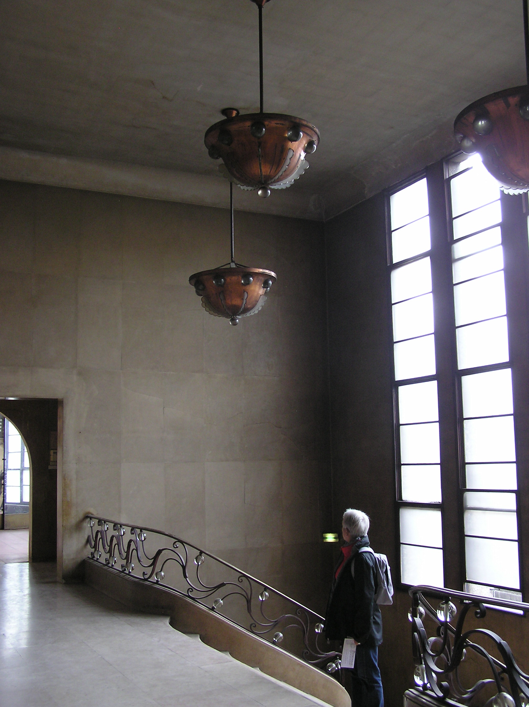 Bordeaux Bourse du travail accès salle Crozat rampe en cuivre et verre et lustres de cuivre